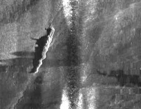 USS_Grunion (SS-216) after being found, USS Grunion (SS-216)